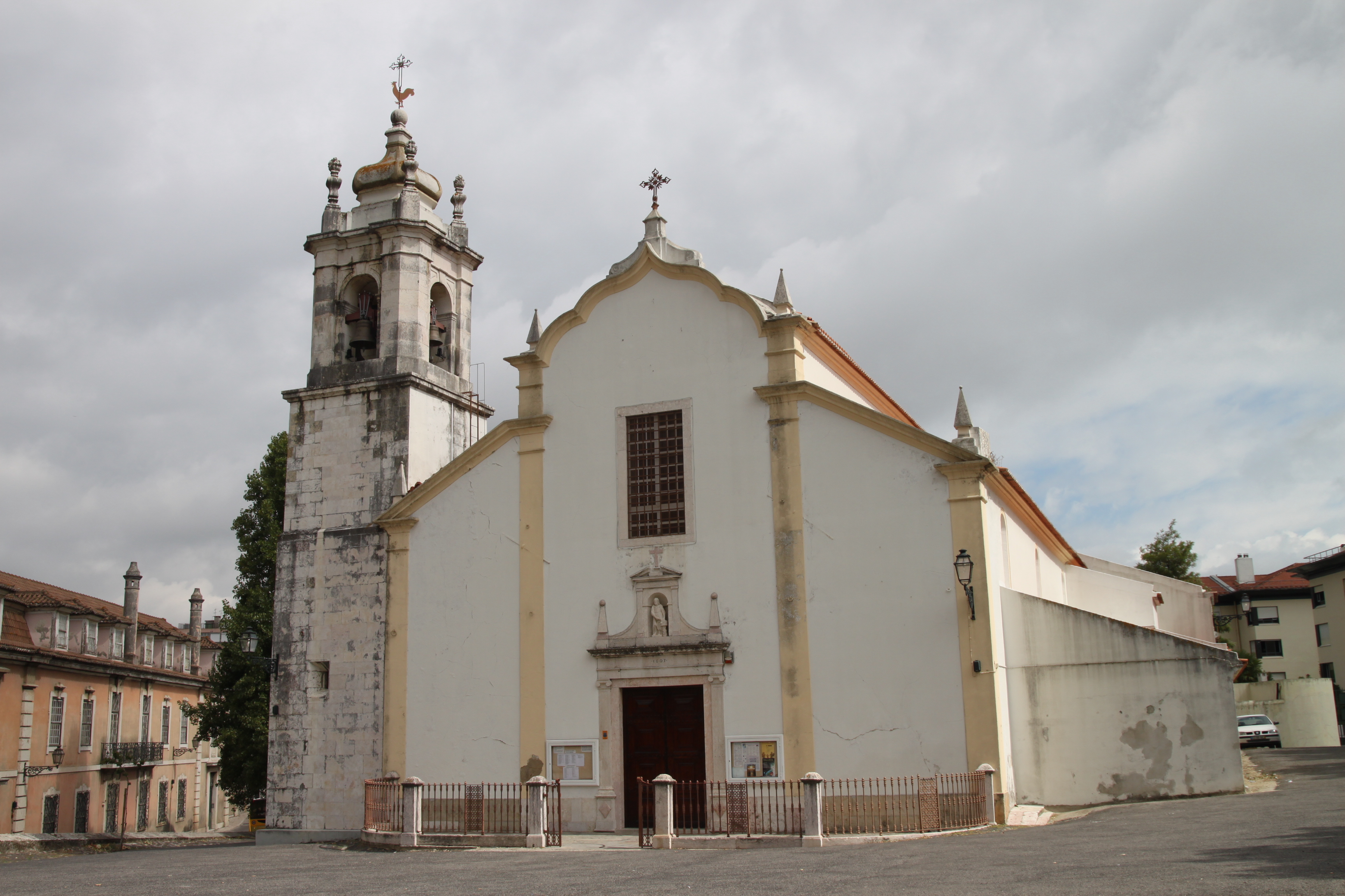 Igreja de São João Baptista This file was uploaded for Wiki Loves Monuments in Portugal with the unique identifier 97005063.